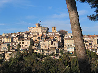 Photo du Haut-de-Cagnes, la vieille ville de Cagnes/Mer (06)